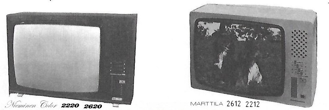 Televisori a colori prodotti dalla Mäkelä di Vigevano (PV) nel biennio 1974-1975